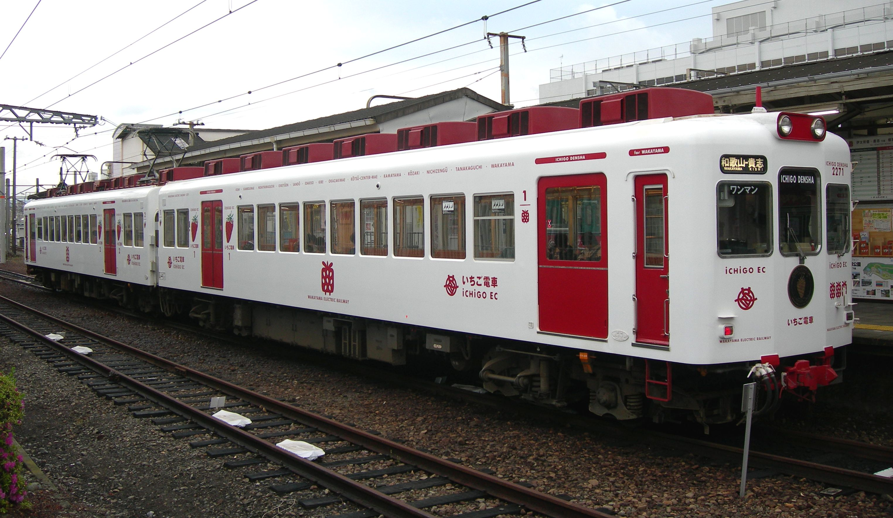 和歌山電鐵いちご電車（和歌山駅にて撮影）